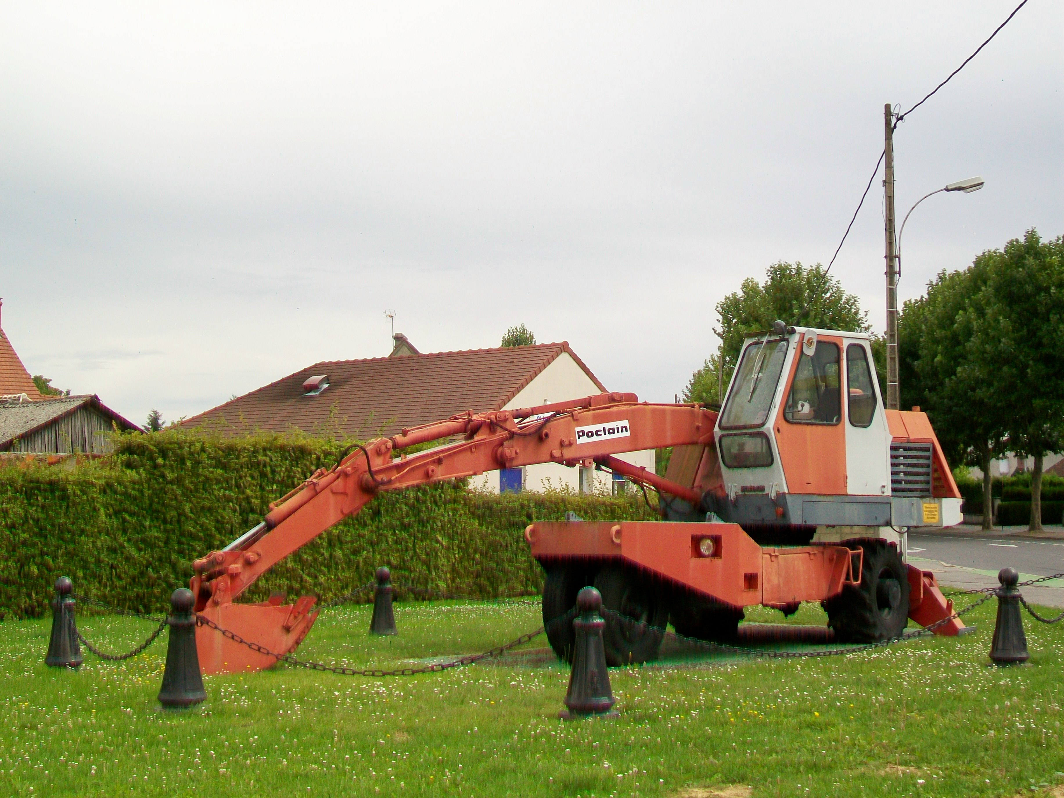 Une pelleteuse Poclain (modèle TY45) comme monument, au carrefour rue Bartholomé / route de Soissons, à Crépy-en-Valois (Oise, France).